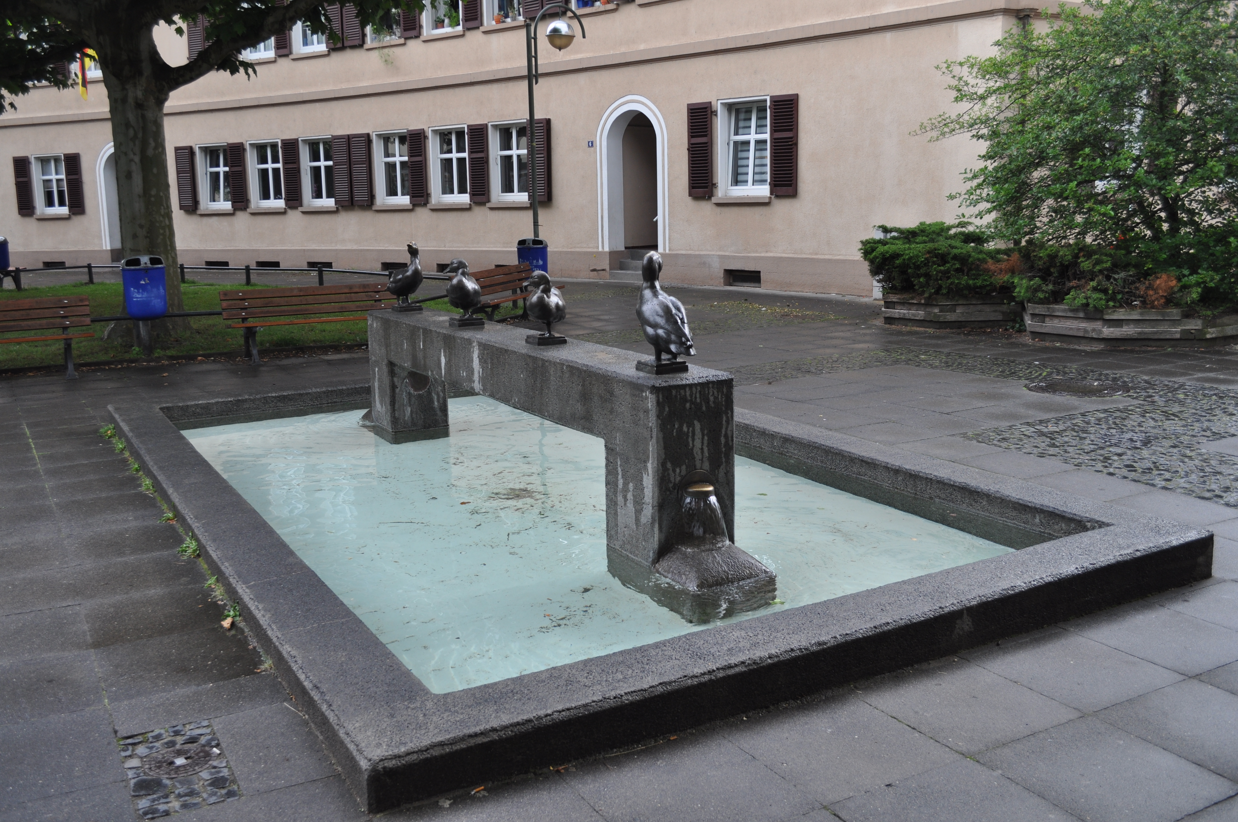 Sindlingen, Entenbrunnen von 1921 nach einem Entwurf des Bildhauers und Tierplastikers August Gaul (1869–1921). Stifter war der Höchster Stadtrat und Farbwerksdirektor Dr.jur. Dr. rer.nat. Richard Weidlich (1878-1960), der sich u.a. 1931 in Berlin vom 1933 in die USA emigrierten Berliner Architekten Hans Wormann das Haus Weidlich, Berlin, Am Hirschsprung 50A, im Stil der Neuen Sachlichkeit mit Einflüssen des Art déco entwerfen ließ.